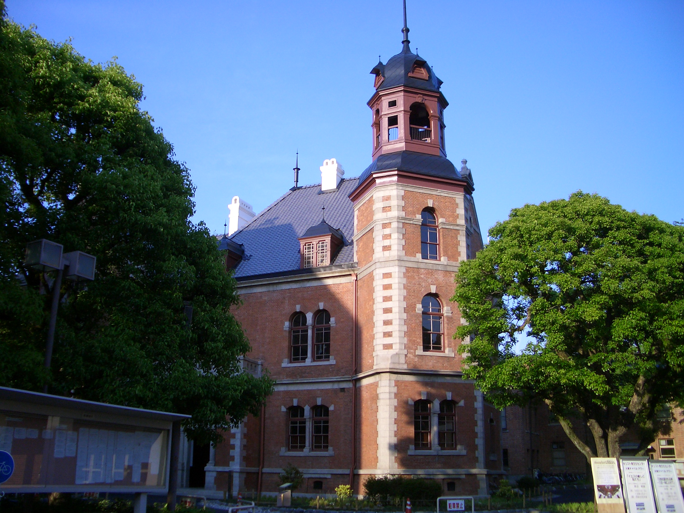 同志社大学クラーク記念館